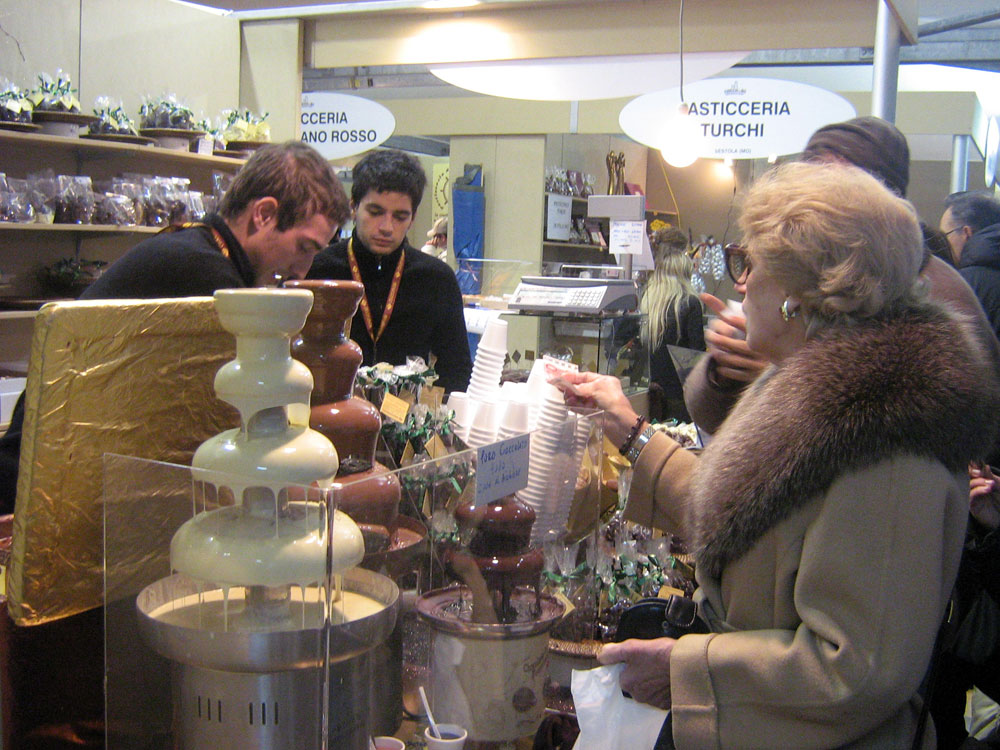 Foto del Cioccoshow 2007, en la ciudad de Bolonia